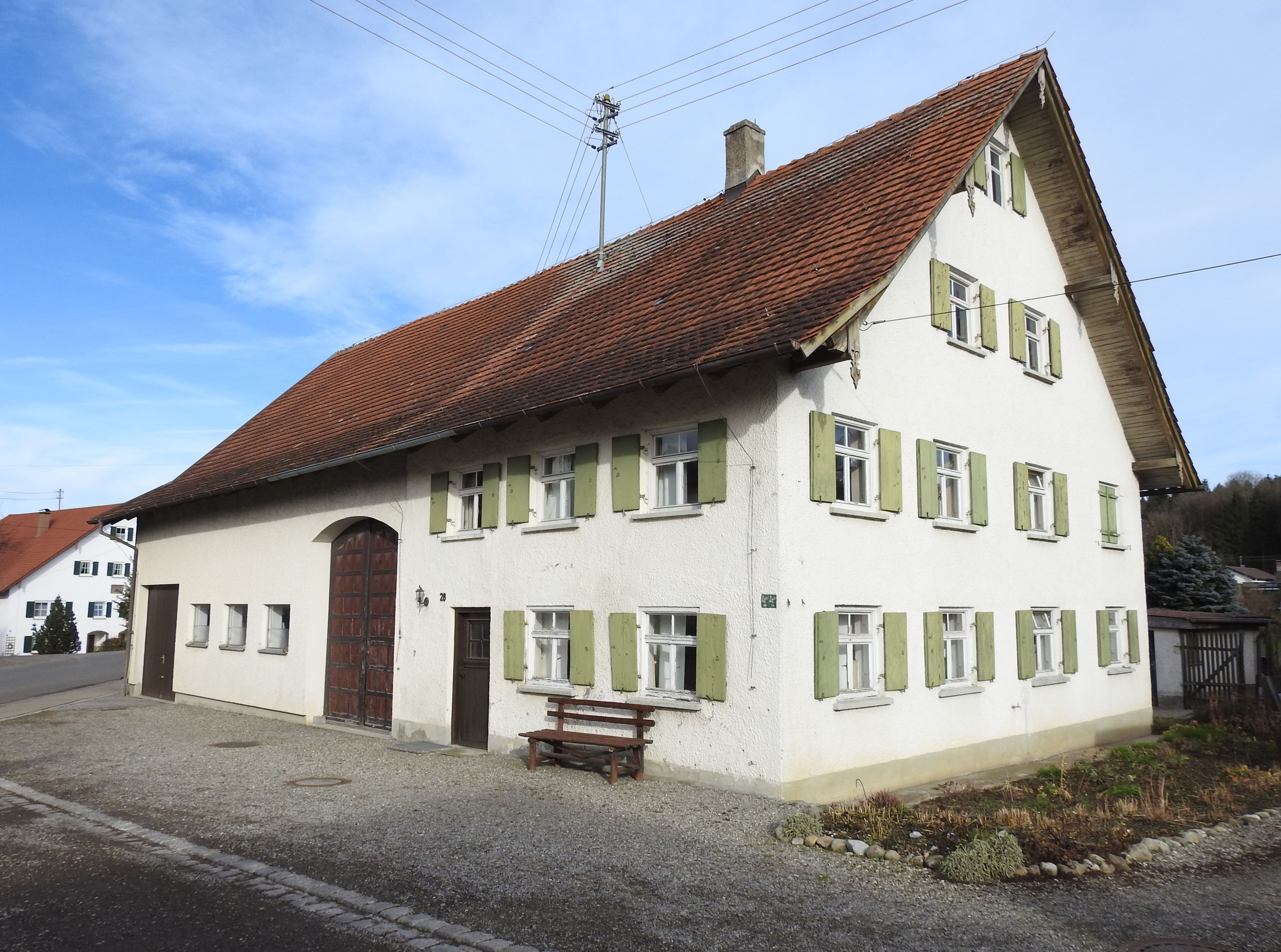 Kleinbäuerliches Anwesen in Ungerhausen